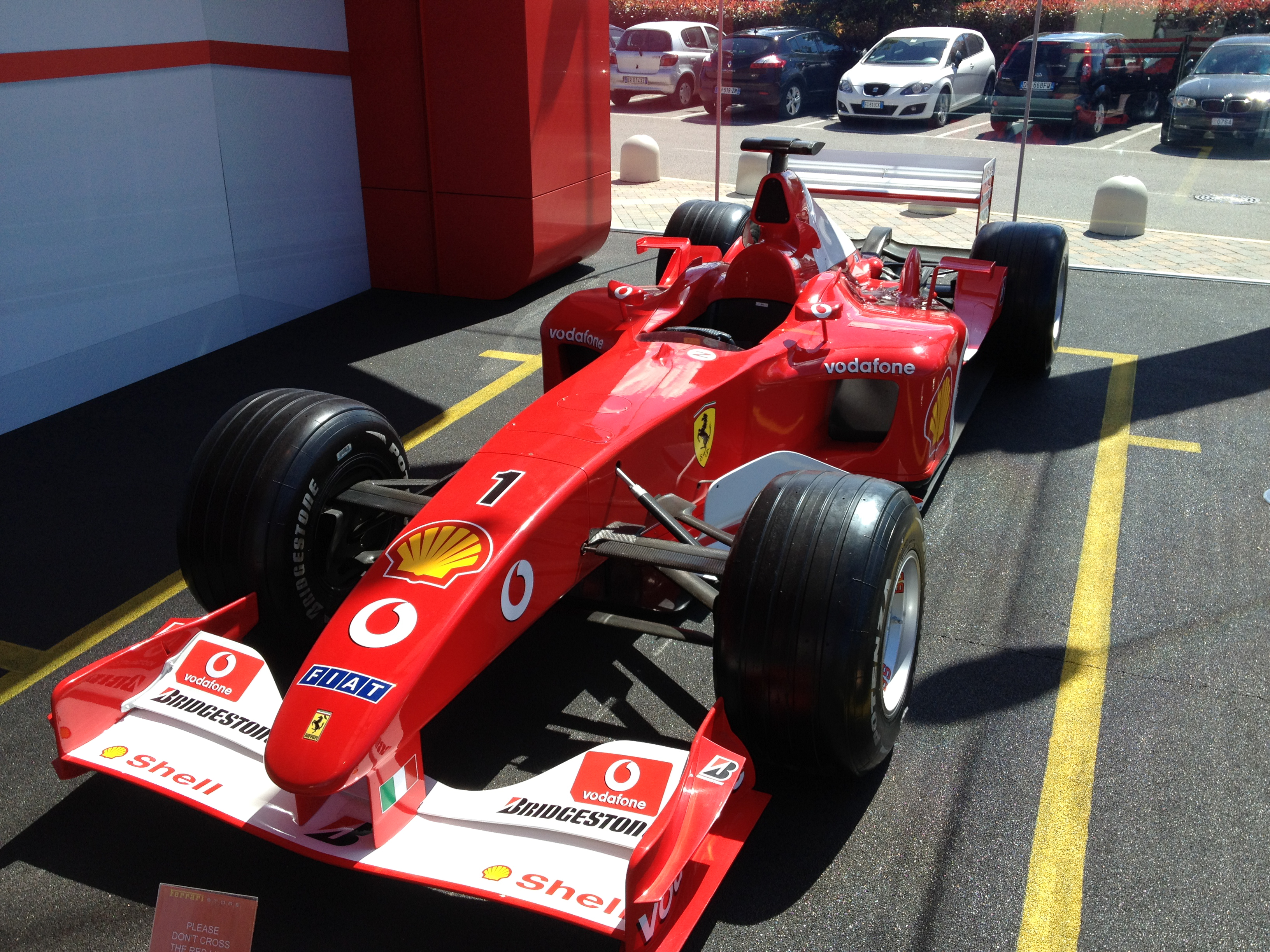 Ferrari store at Serravalle Designer Outlet, Serravalle Scrivia